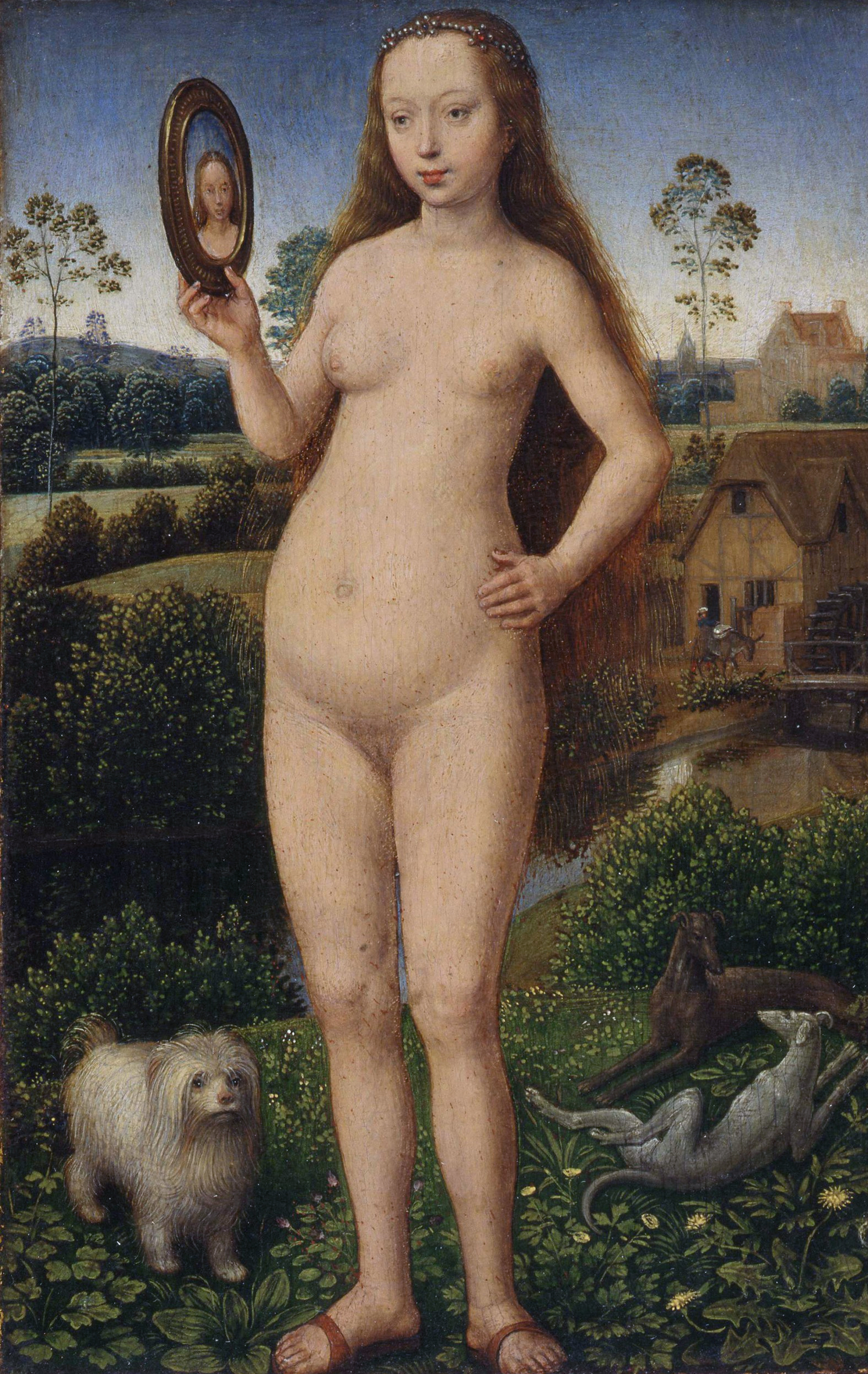 Vanité